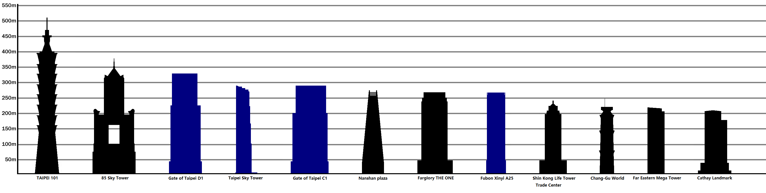 Taiwan's tallest building with competition.